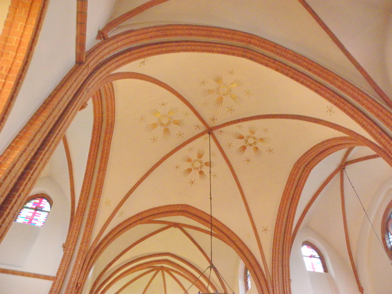 Kath. Kirche St. Peter und Paul in Eberswalde